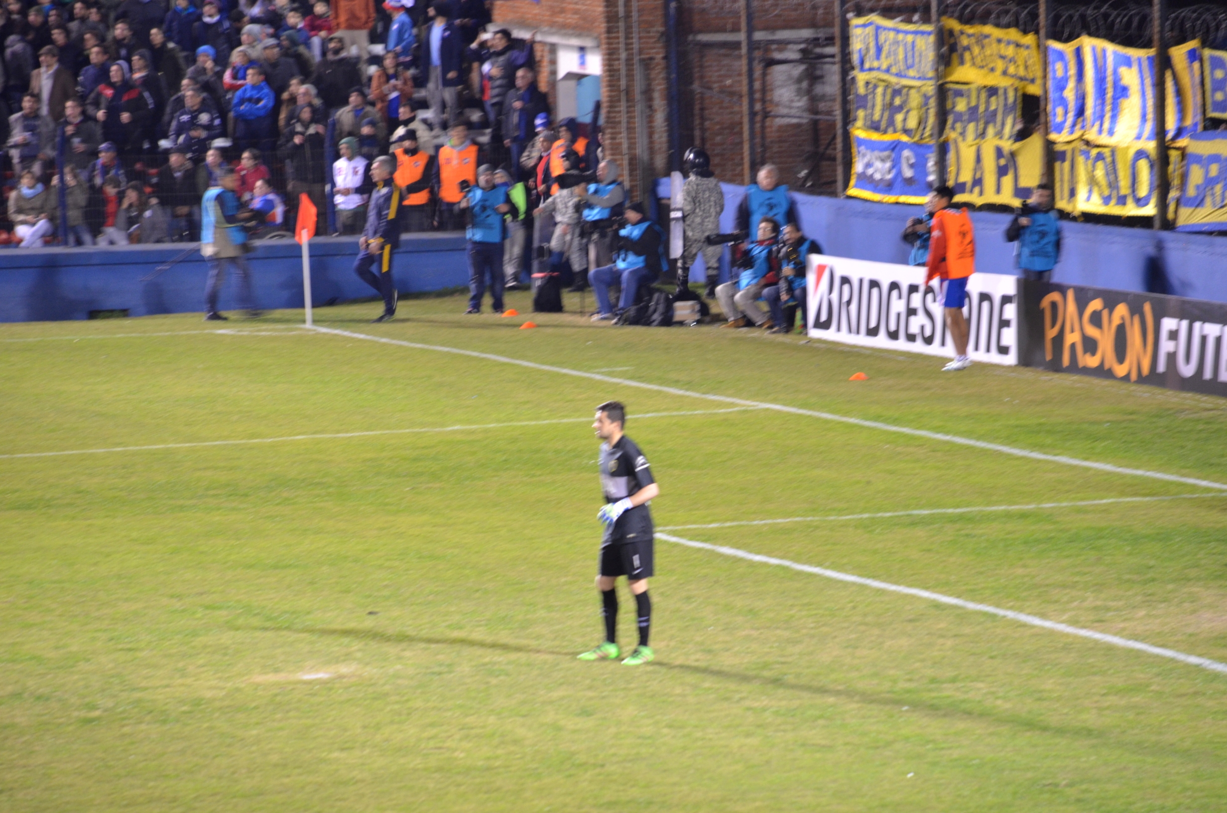 Imagen del partido disputado entre Nacional y Boca Juniors, en el estadio Gran Parque Central, por los cuartos de final de la Copa Libertadores 2016